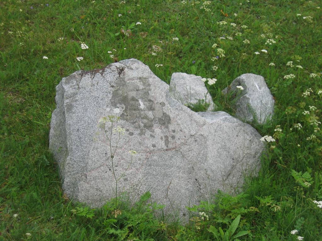 Runsten U 13, Husby; Munsö. Stenen är ett fragment, sönderslagna stycken ligger bredvid. Texten är inte lätt att urskilja men den har blivit tydd och lyder: "Toröt de... ande och Guds."